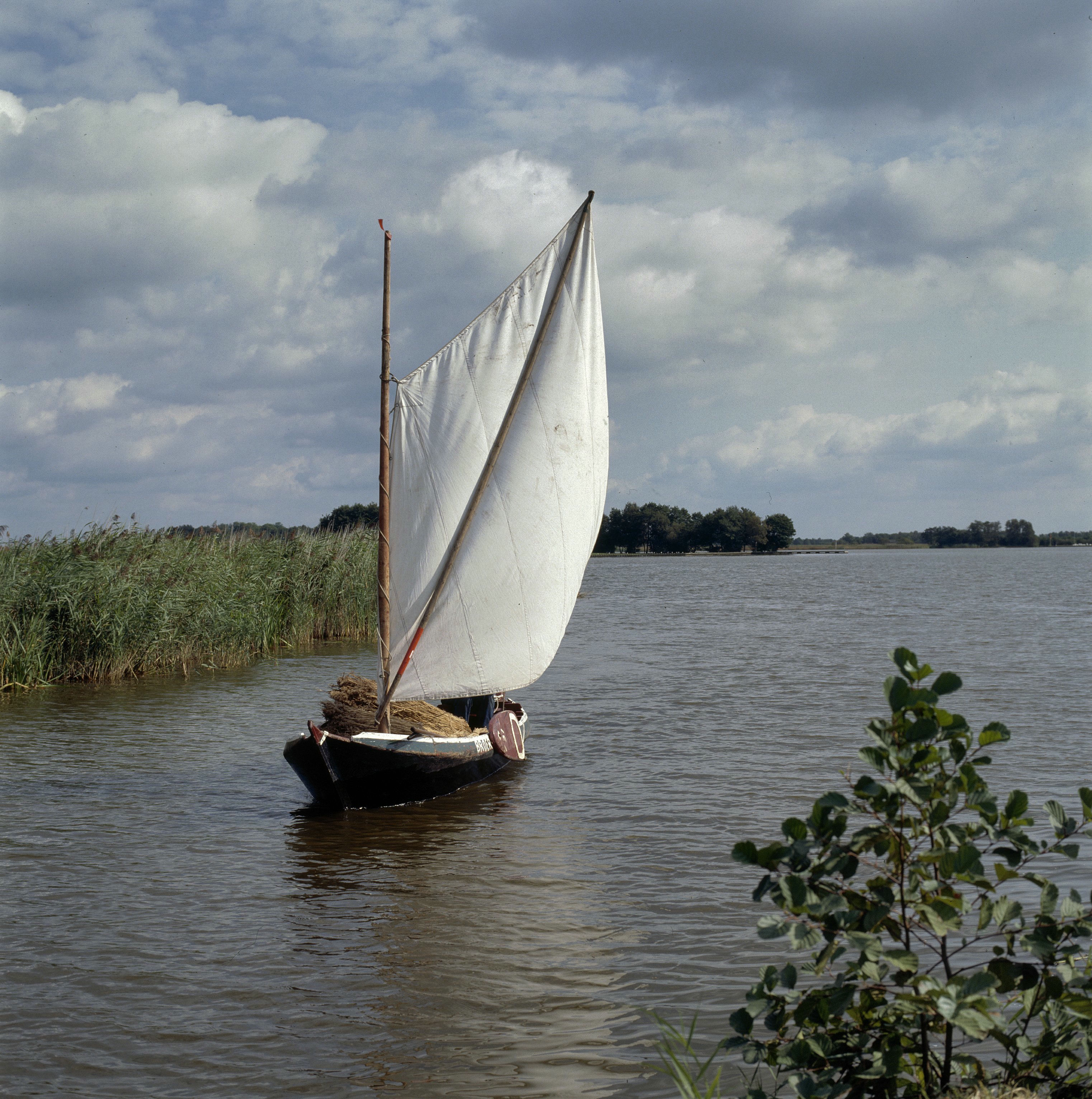 Giethoorn/ Riet: Zeilen in een met riet beladen punter (opmerking: Gefotografeerd voor Monumenten In Nederland Overijssel)